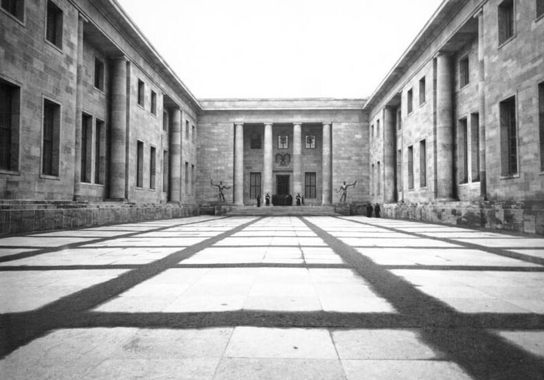 Berlin, Neue Reichskanzlei ADN-Zentralbild/ Archiv 10.1.1939 Die Neue Reichskanzlei in Berlin UBz.: Der Ehrenhof